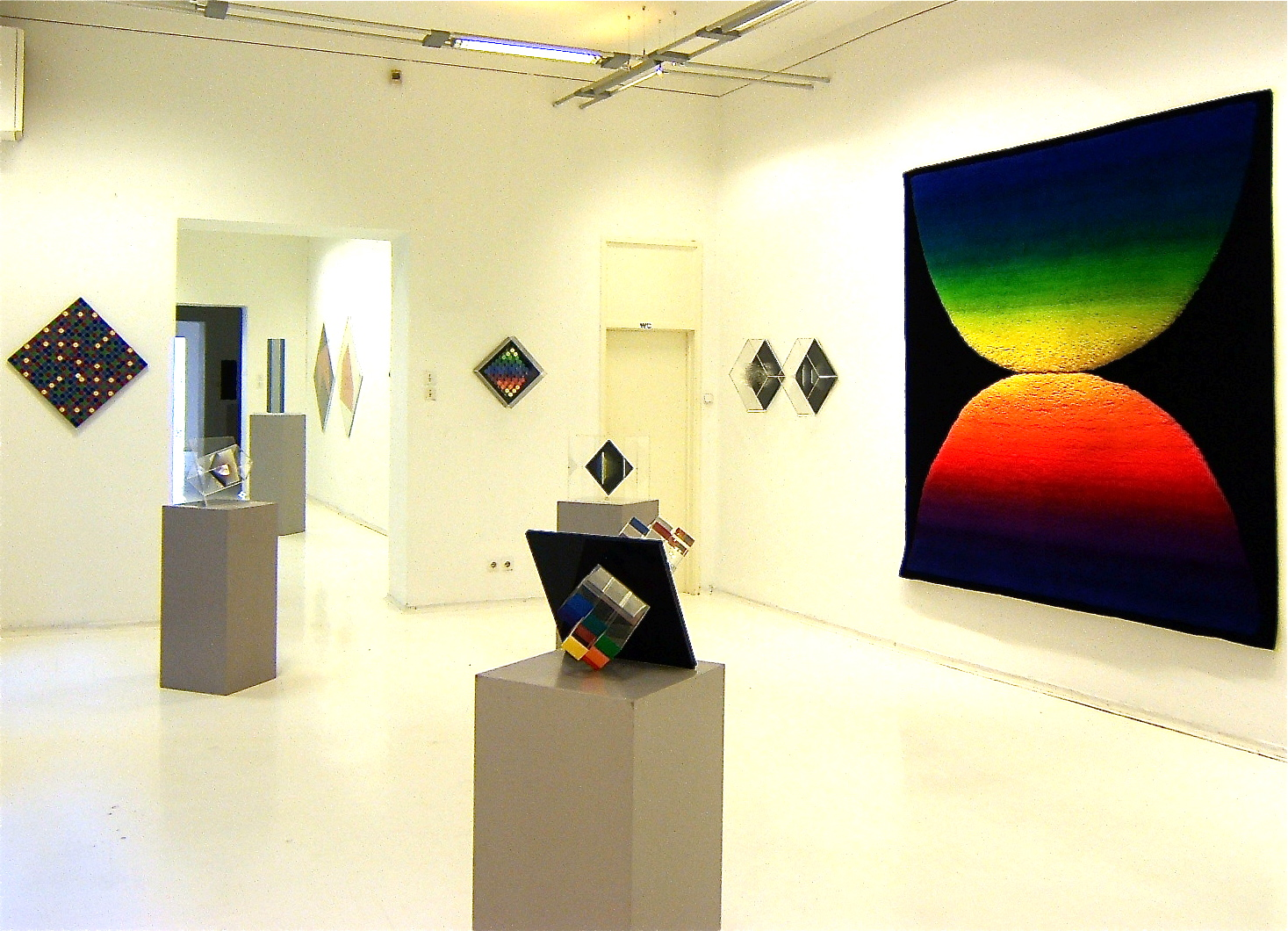 Ausstellung Edgar Knoop: Traces - beyond the Horizons; Retrospektive 1966 - 2006, City Art Museum Ljubljana